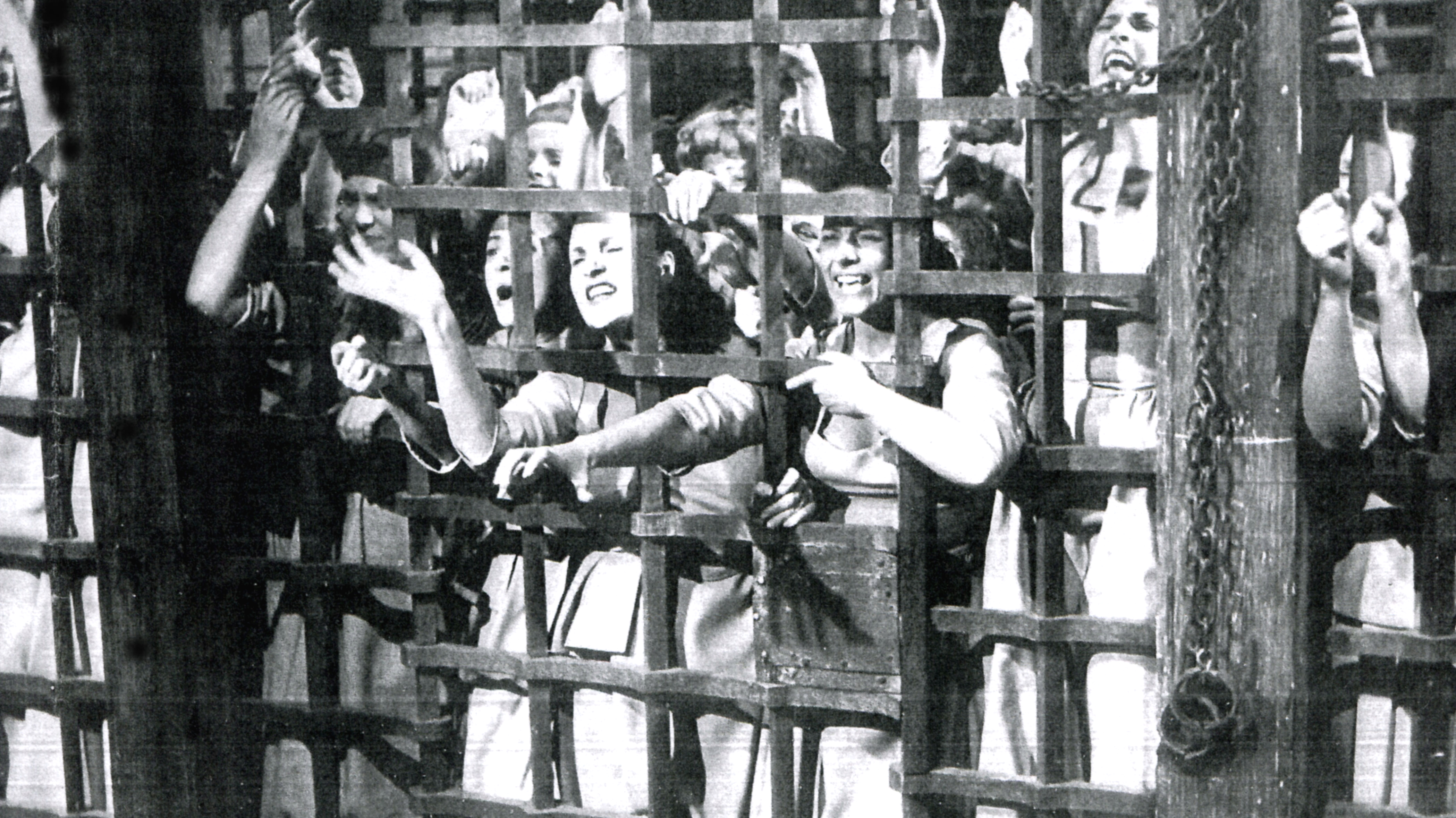 scena de "La nave delle donne maledette" (Matarazzo, 1953)